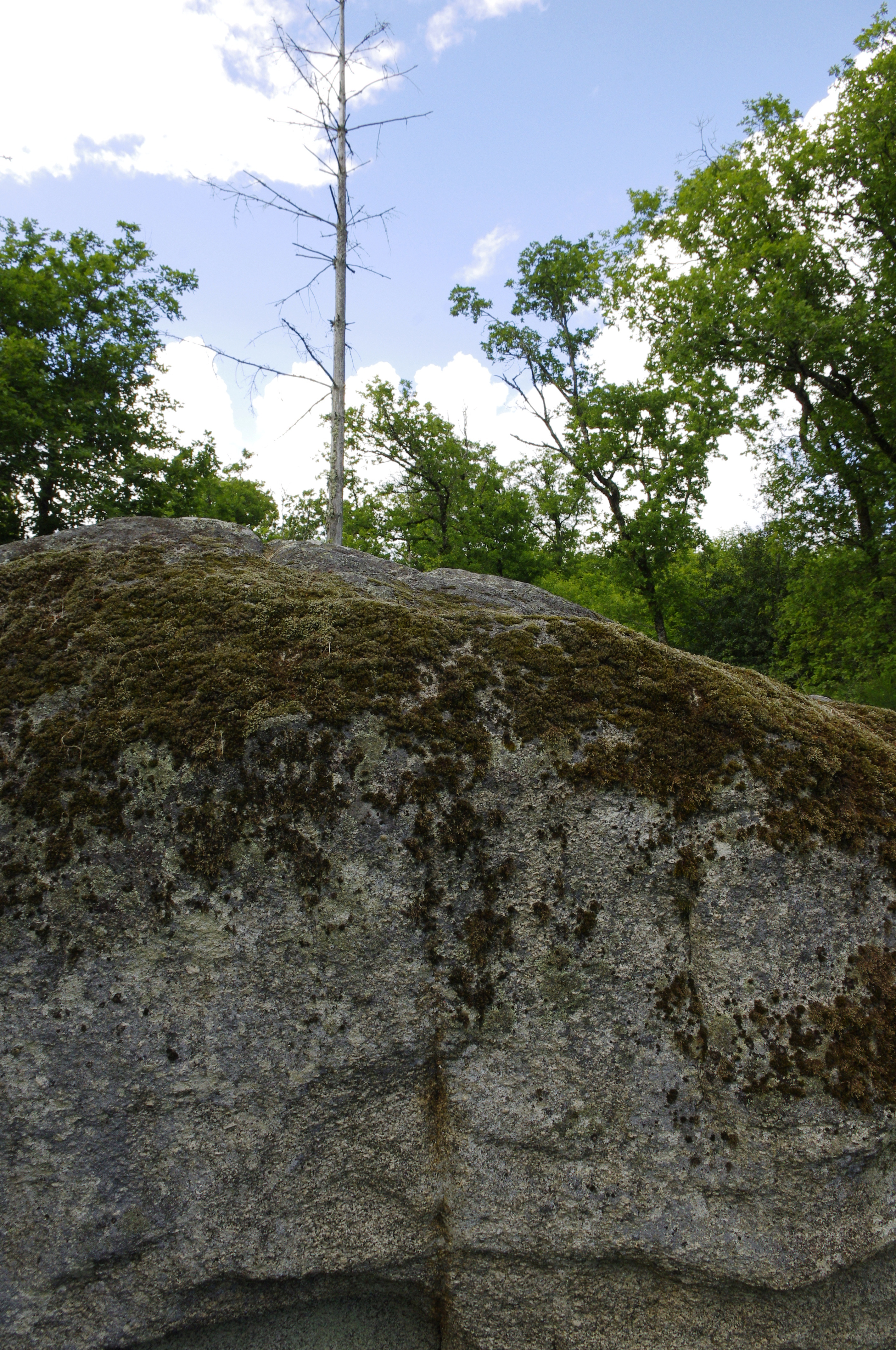 Pierre à sacrifice altitude 372m à Centurat, commune de Cieux, Haute-Vienne, France